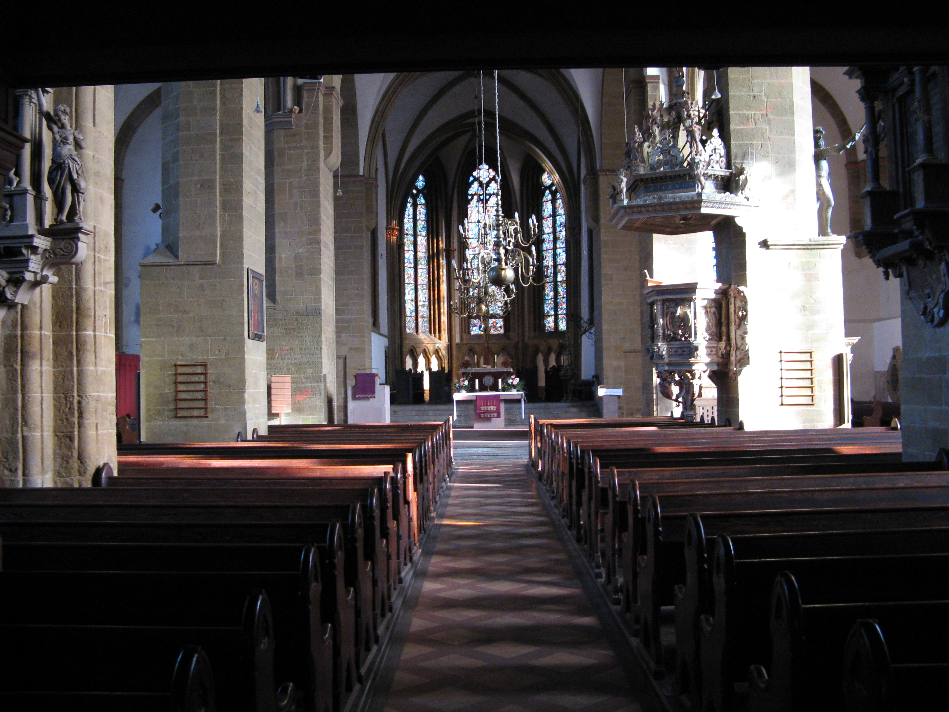 Innenraum der Martinikirche (St. Martini) in Minden, Nordrhein-Westfalen. Die Kirche wurde stammt aus dem 11. Jahrhundert.